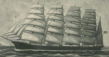 Die Potosí (Schiff), eine deutsche Fünfmastbark